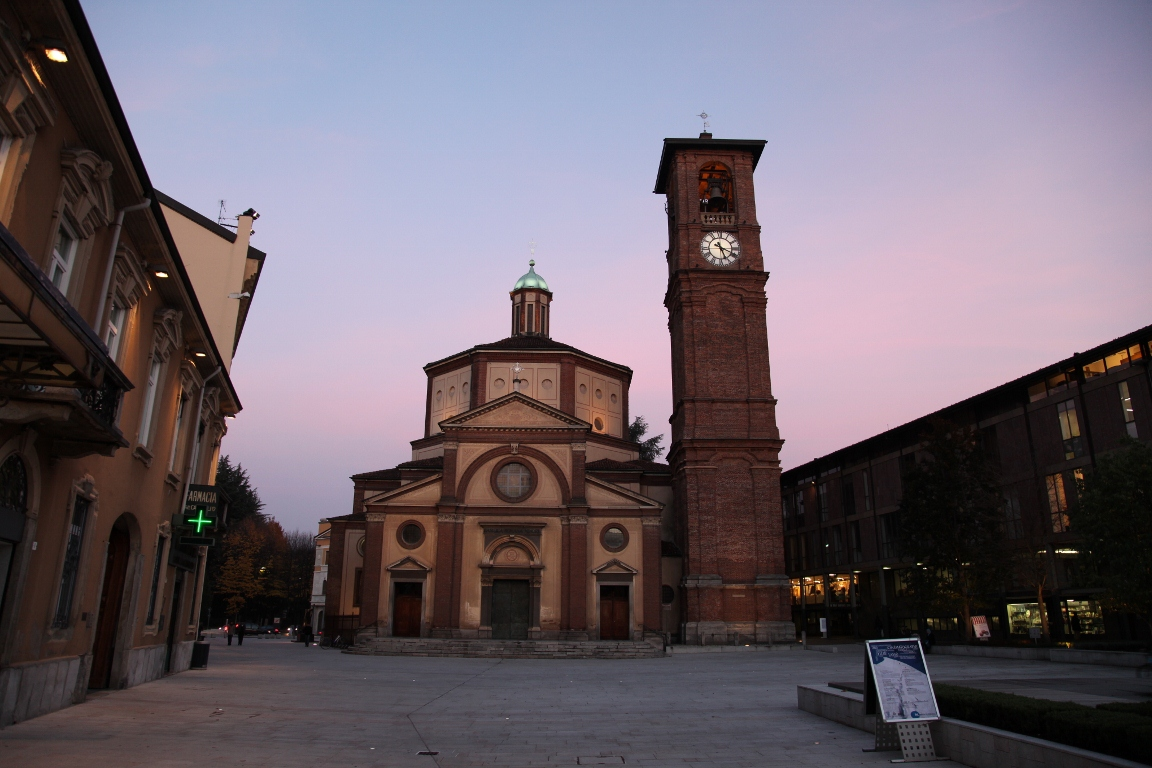 Legnano 11/2010